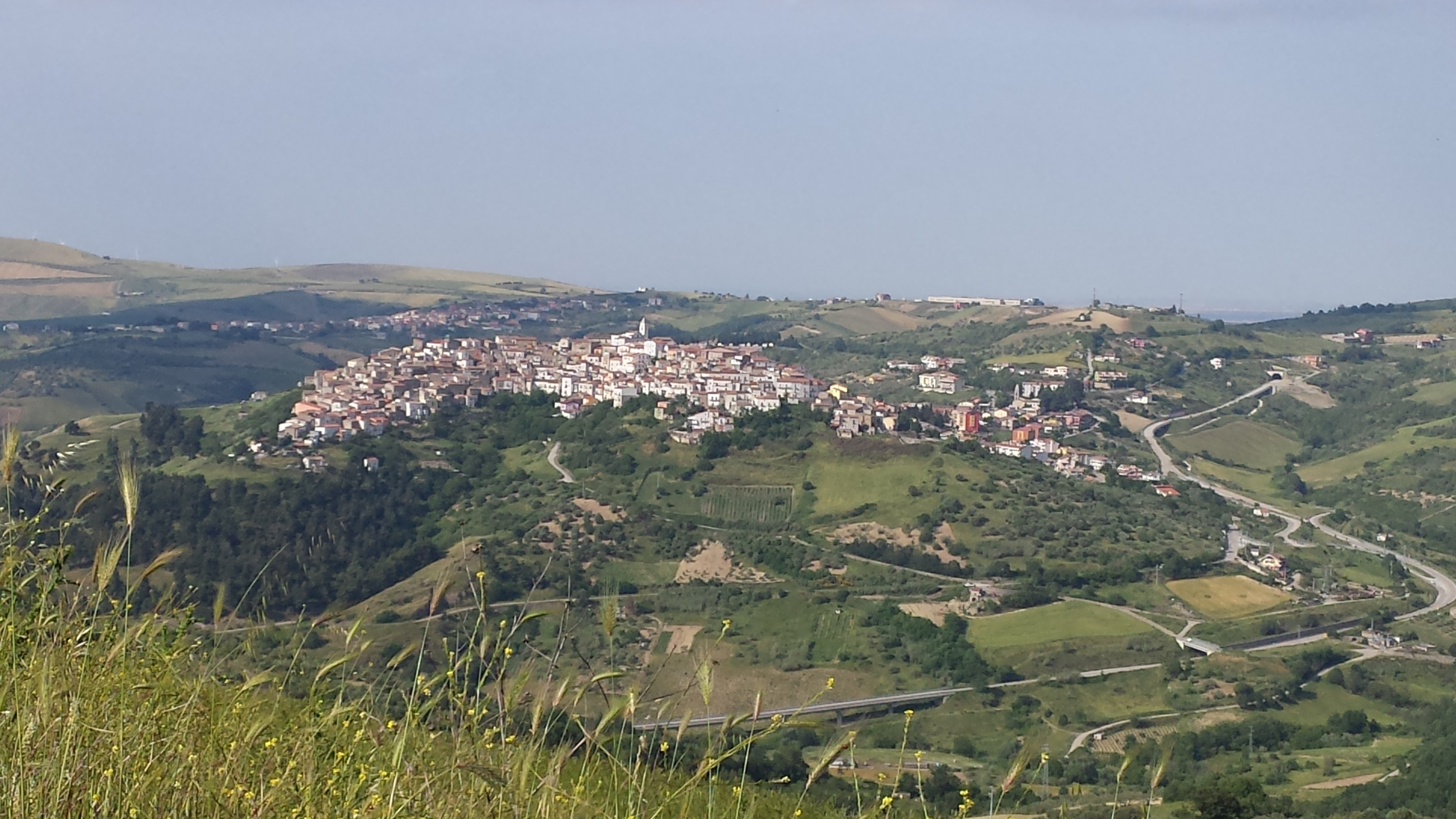 Ripacandida